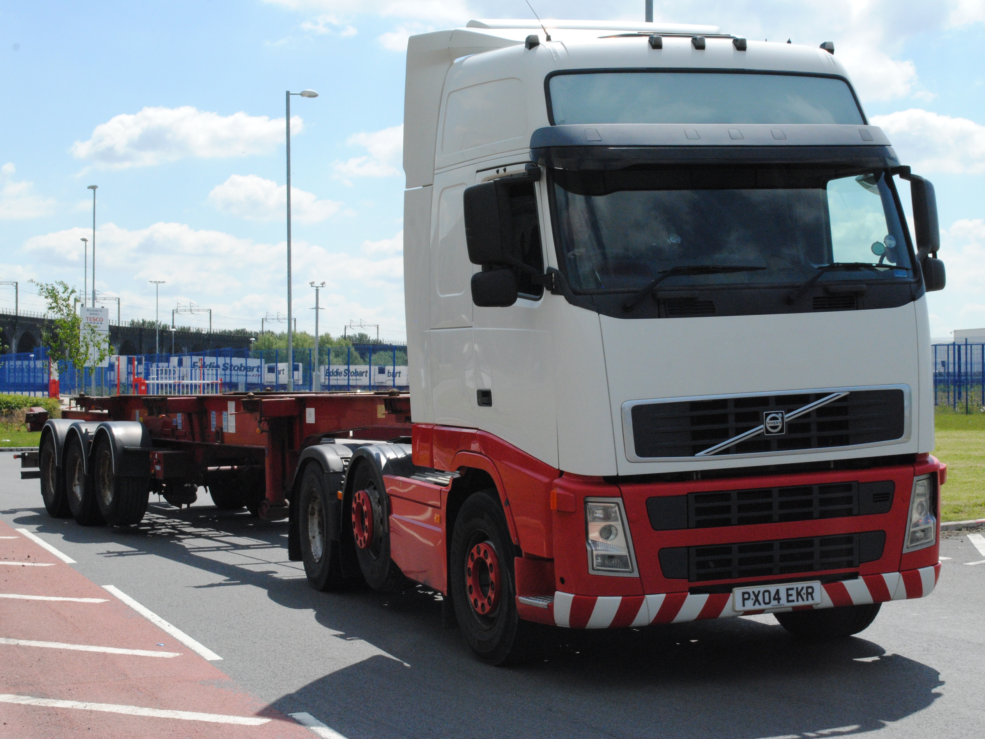 Volvo FH (ex Eddie Stobart H2823 Roberta Mary). seen here in Widnes